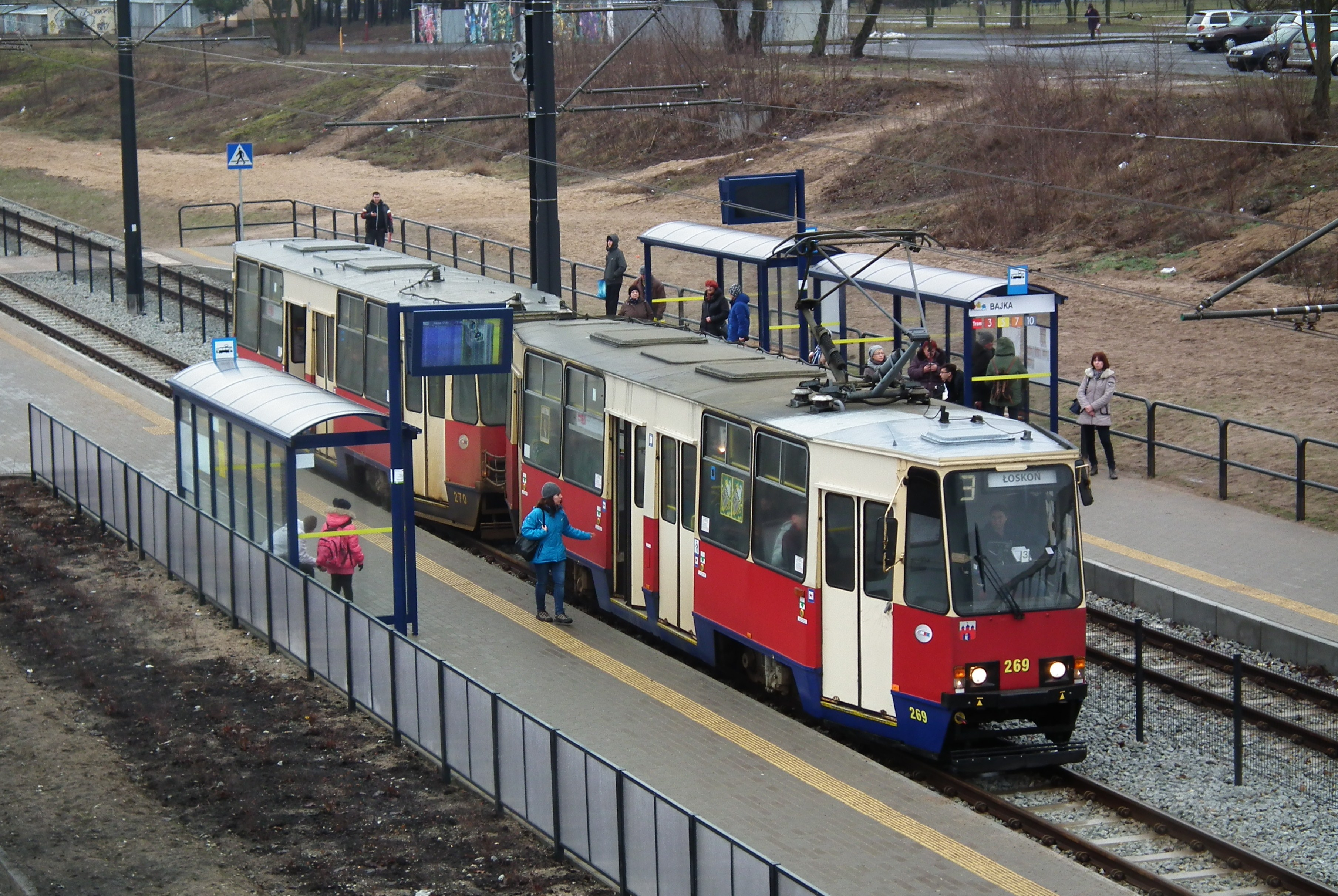 Linia tramwajowa na Łoskoń w Bydgoszczy.